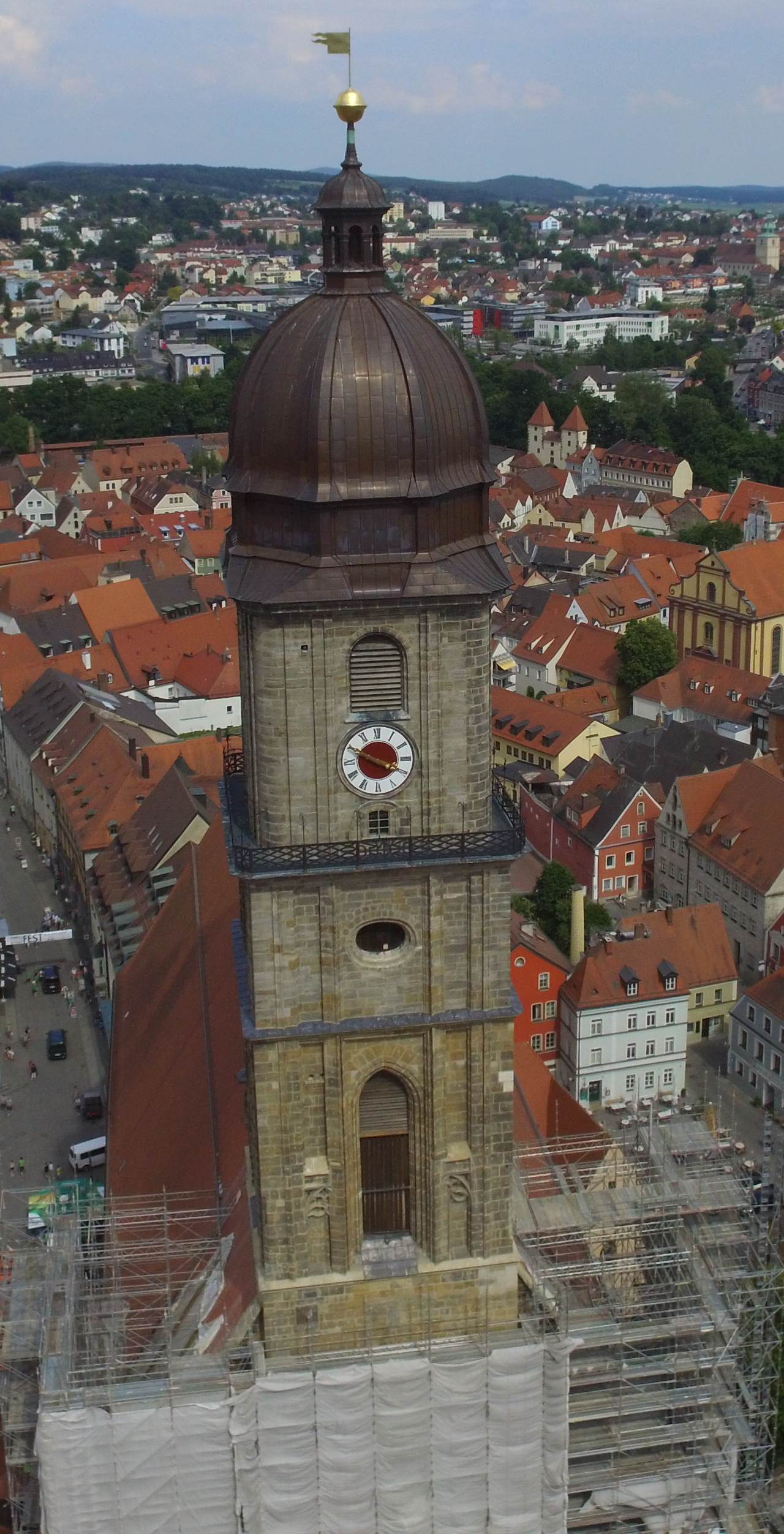 Die Kirche mit neuem Kupferdach.